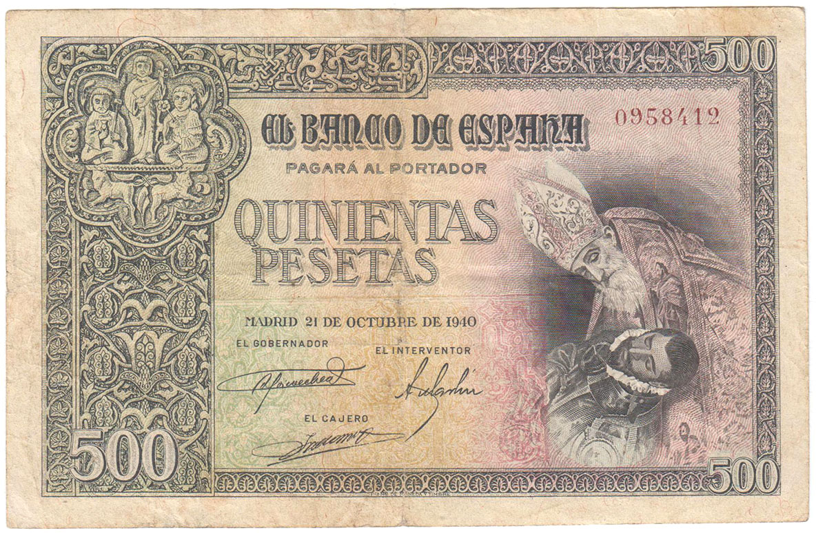 500 Pesetas. 21 Octubre 1940. Sin serie. ED.D45. Escaso. MBC